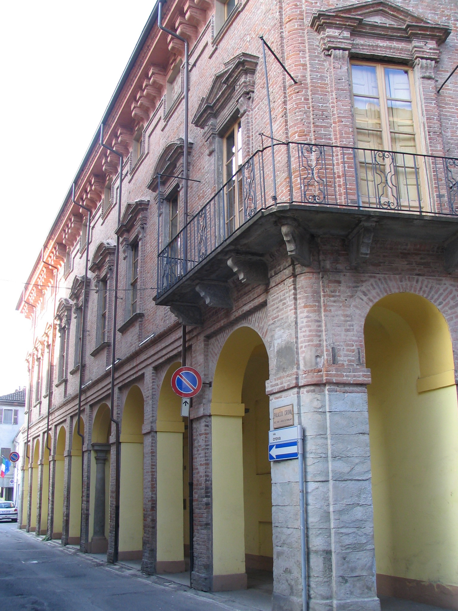 Nizza(Asti) Crova Palace